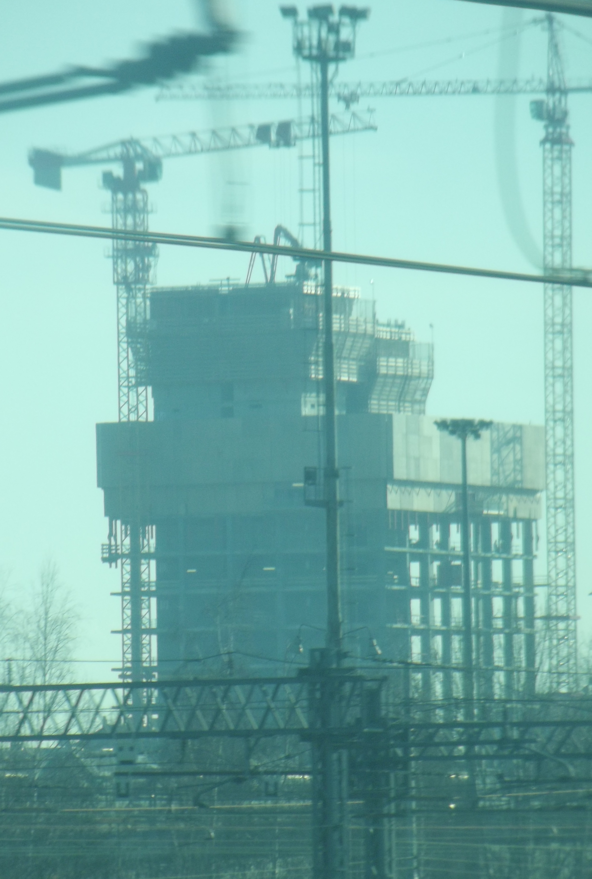 Sede unica della Regione Piemonte: i lavori nel gennaio 2014